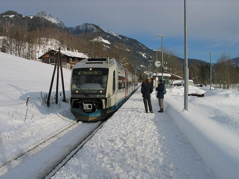 Integral am Bahnhof Geitau, Bayern, Deutschland